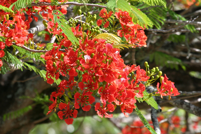 Delonix regia